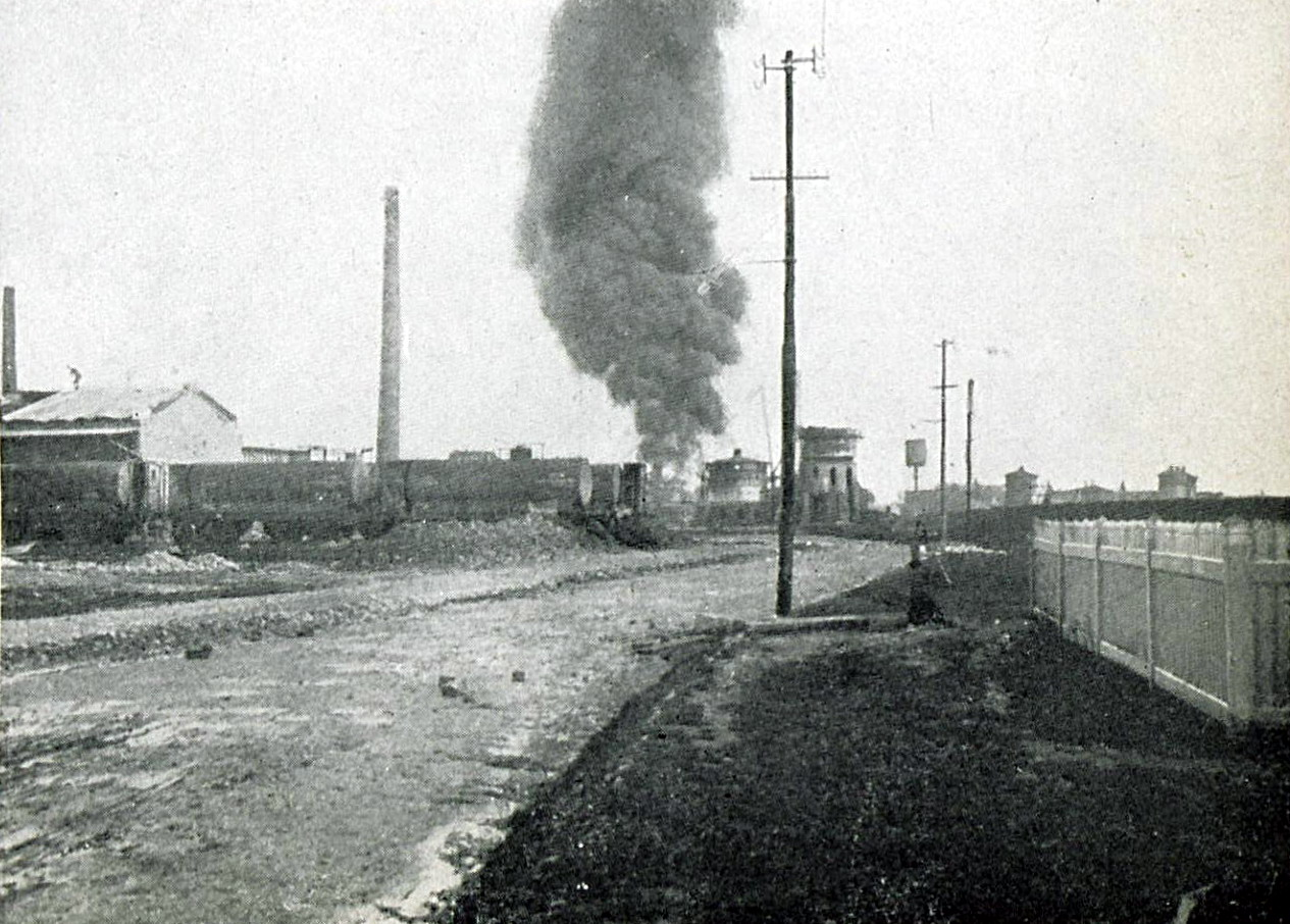 1916 - Album foto - Ploiesti 1916 Incendiu la o instalatie petroliera